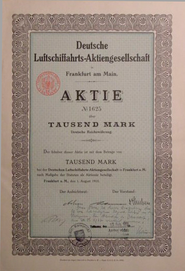 DELAG-Aktie Sonstiges: ...